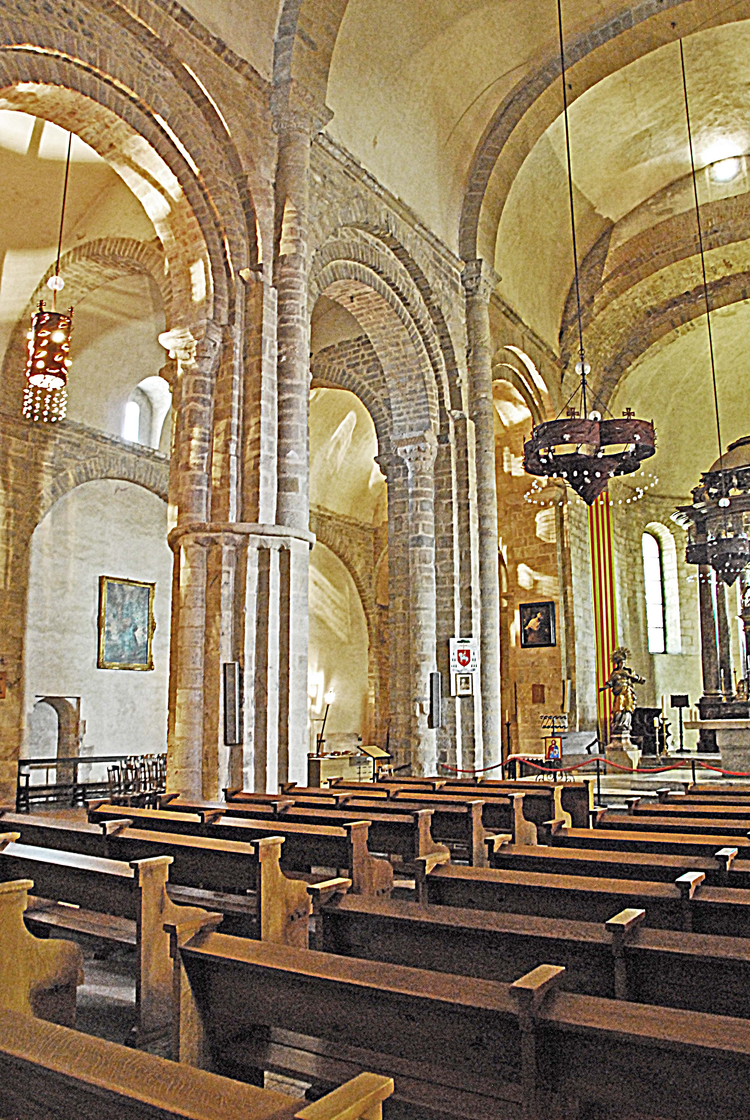 Ste-Eulalie-et-Ste-Julie_d’Elne, Mittelschiff, nördl. Scheidewand